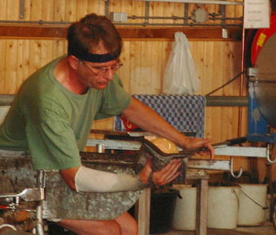 Zelfgemaakte media